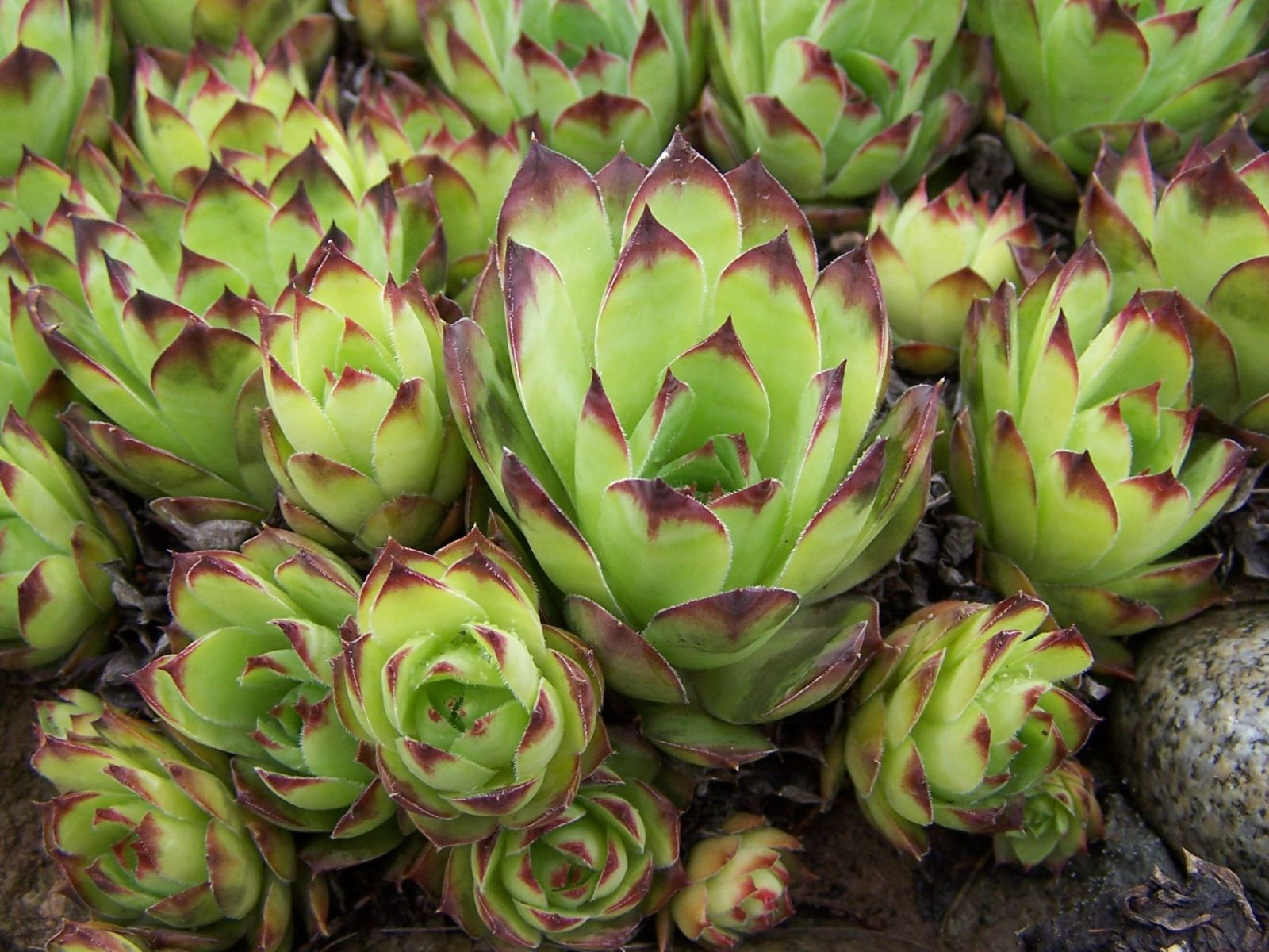 Sempervivum tecotrum